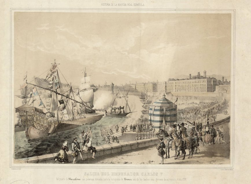 Salida del Emperador Carlos V del puerto de Barcelona con poderosa Armada, para la conquista de Túnez, uno de los hechos más gloriosos de su reinado (año 1535), de Vicente Urrabieta (1854).